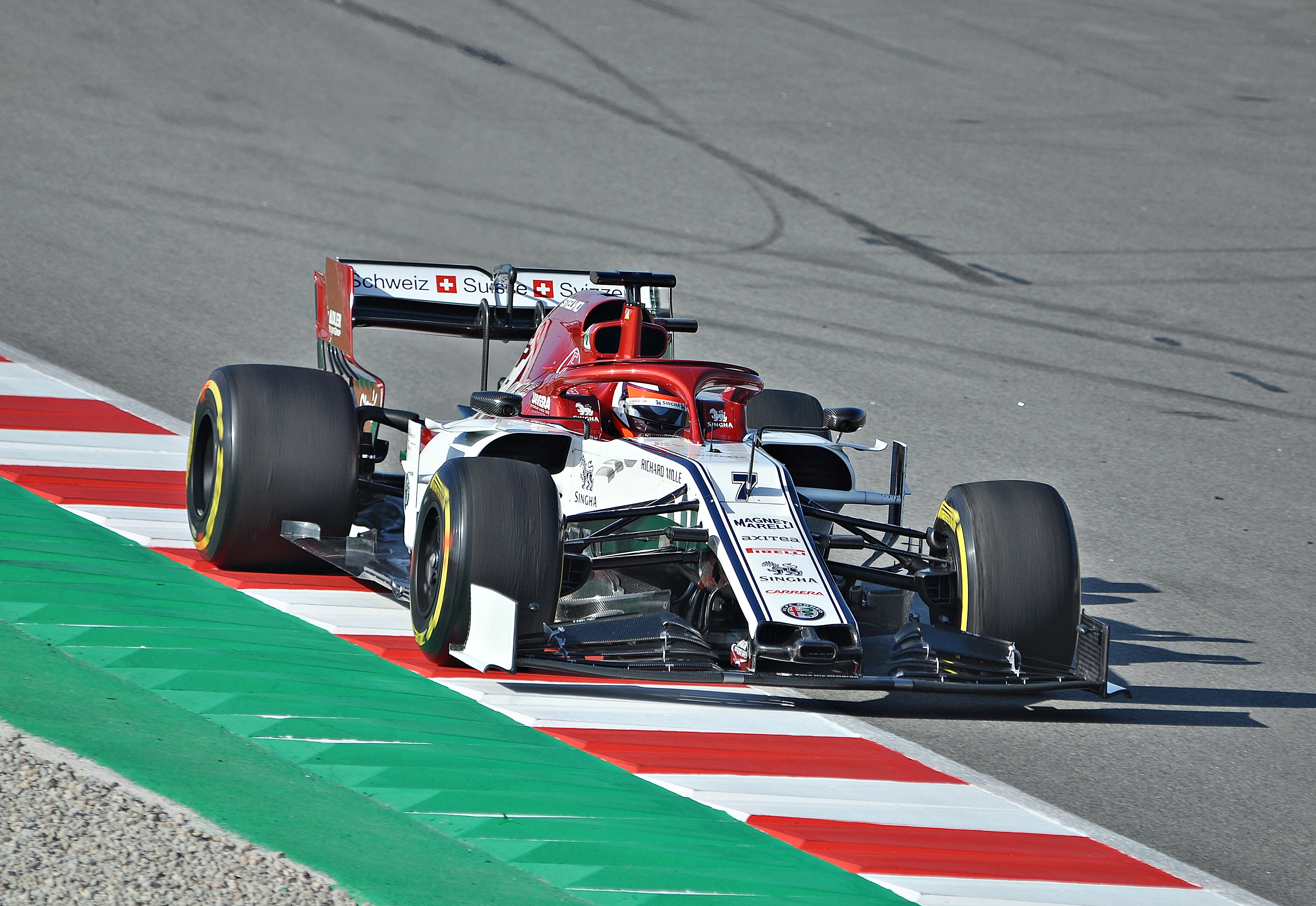 Test Days-Circuito de Catalunya